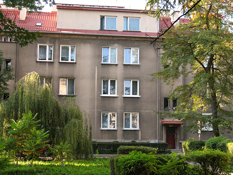 Nowa Huta osiedle Krakowiaków - blok